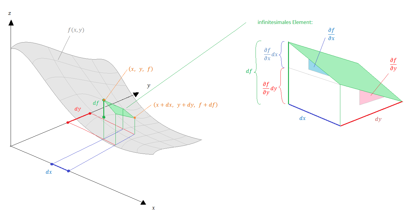 Abgebildet ist eine Funktion im drei-dimensionalen Raum. Anhand eines eingezeichneten infinitesimalen Elementes wird das totale Differential erklärt.